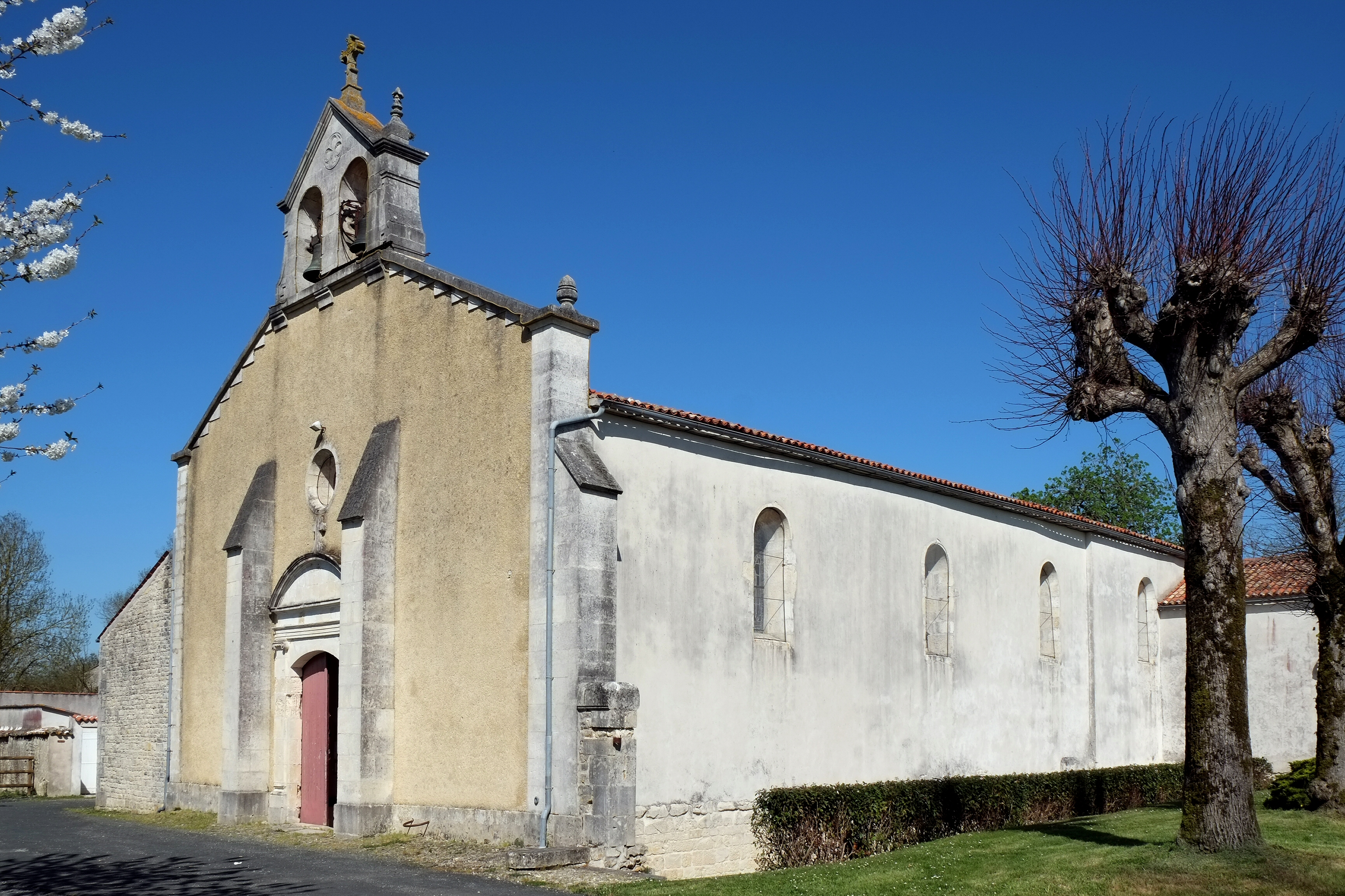 Église de Saint-Médard-d'Aunis Charente-Maritime France